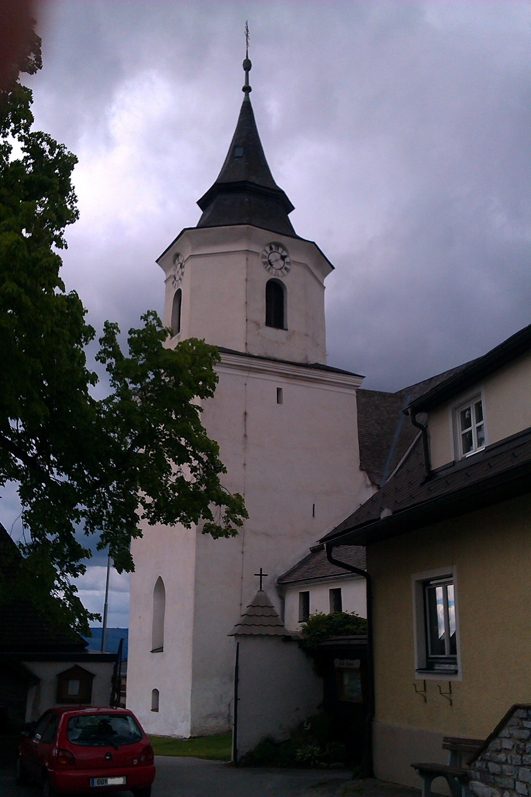 Kath. Pfarrkirche hl. Katharina von Alexandria und Friedhof